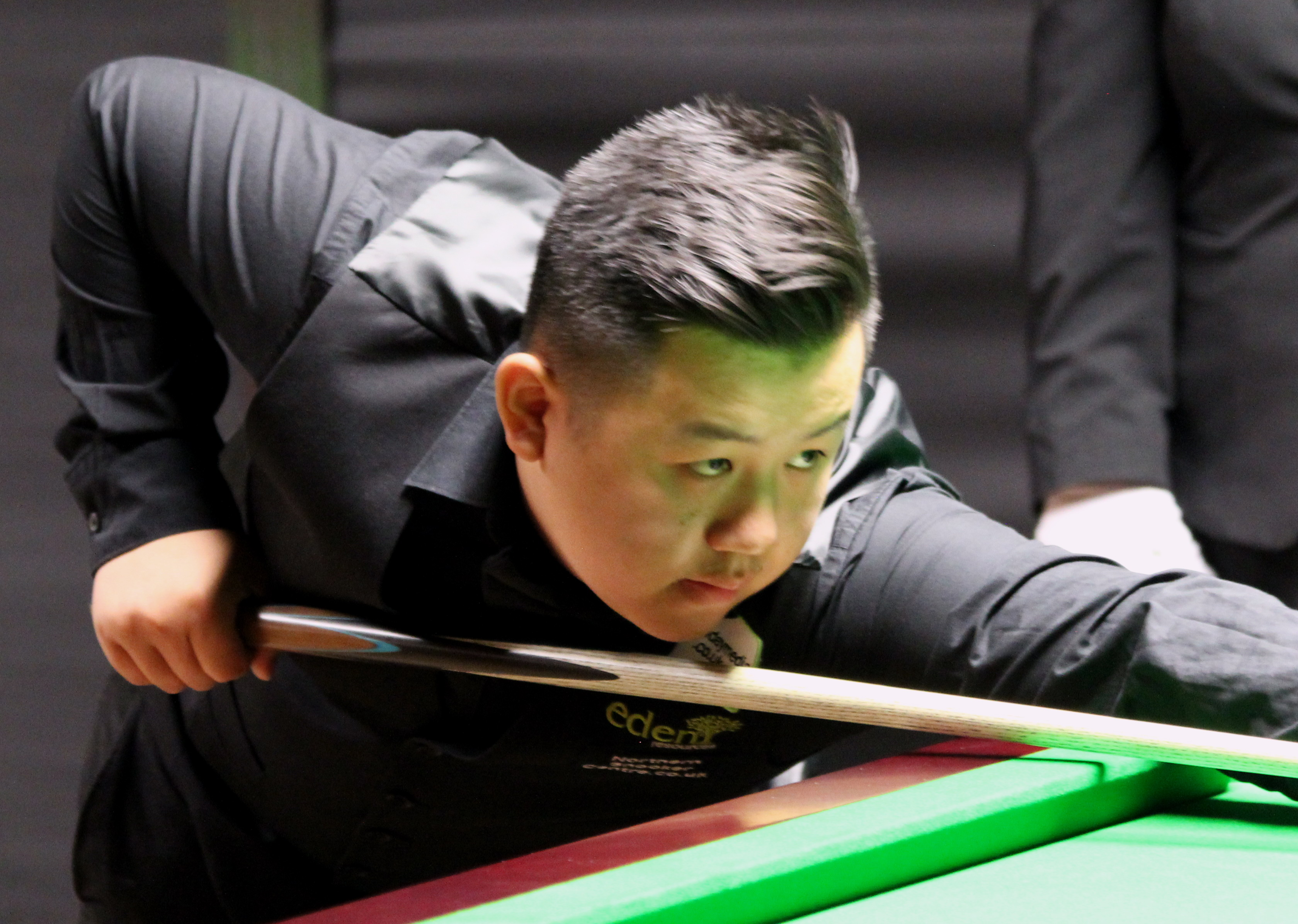 Sanderson Lam beim Paul Hunter Classic 2016